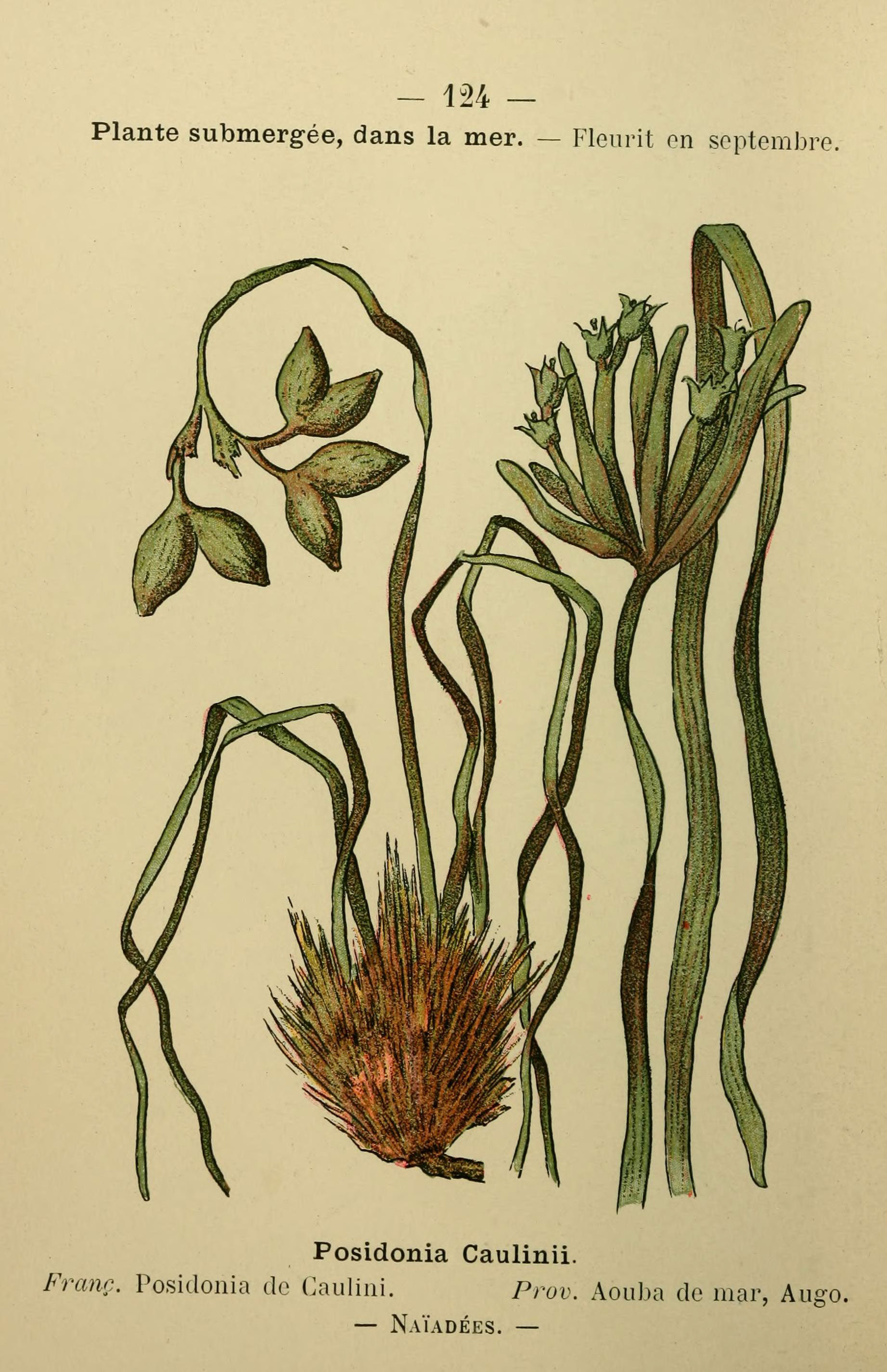 124 — Plante submergée, dans la mer. — Fleurit en septembre. Posidonia Caulinii (Posidonia oceanica). Français Posidonia de Caulini Provenance : Aouba de mar, Août — Naïadées. —